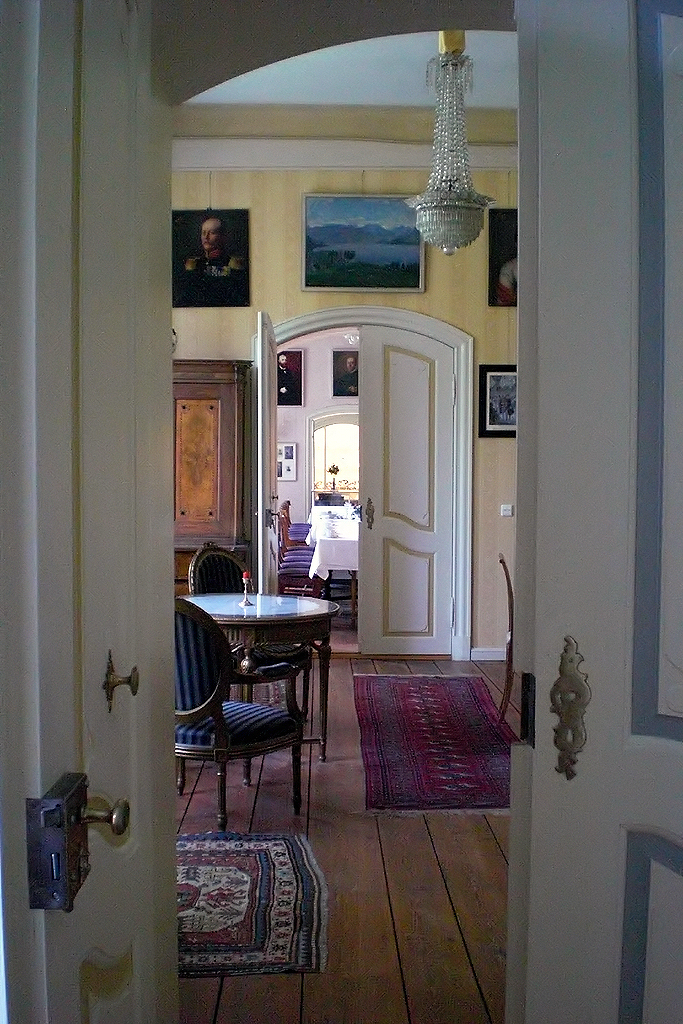 Die Zimmer im Hauptflügel des Schlosses Wolfshagen sind in einer sogenannten Enfilade angeordnet.